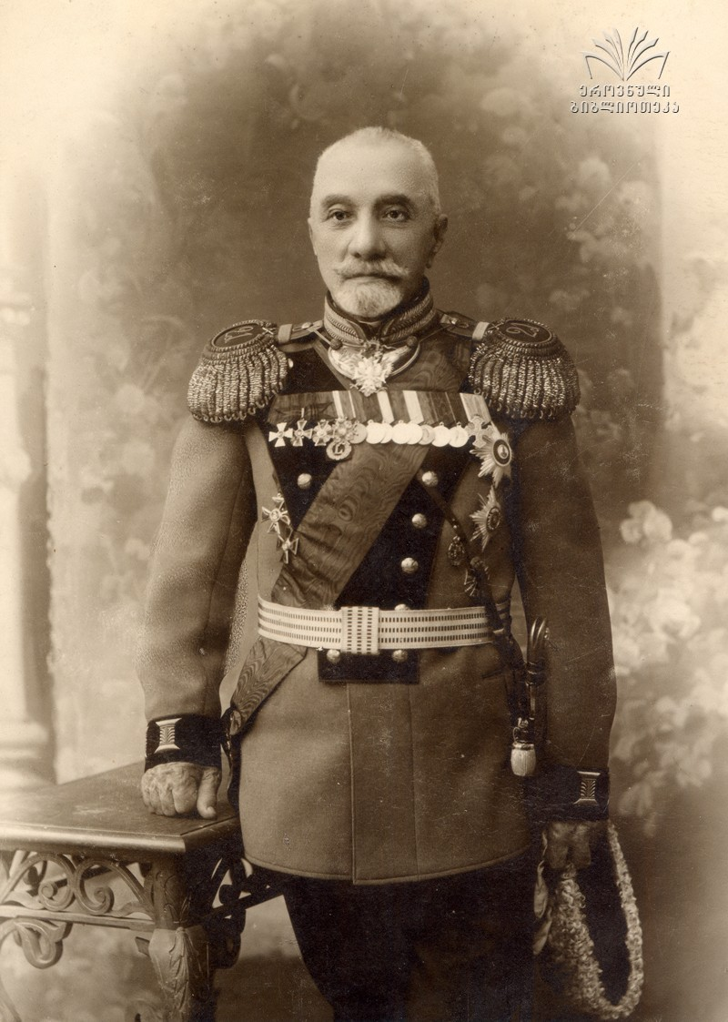 გიორგი ხიმშიაშვილი